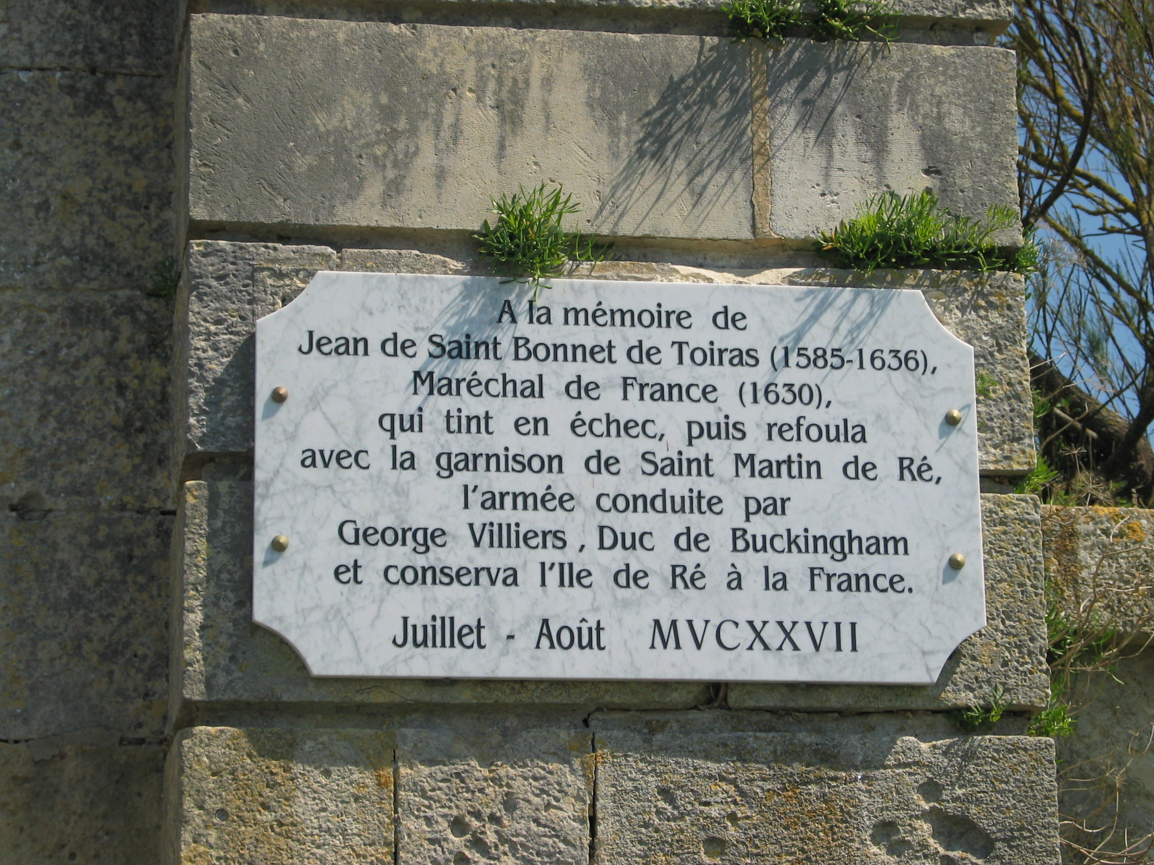 Plaque commémorative de Jean de Saint-Bonnet de Toiras sur le site de la citadelle de Vauban sur l'île de Ré